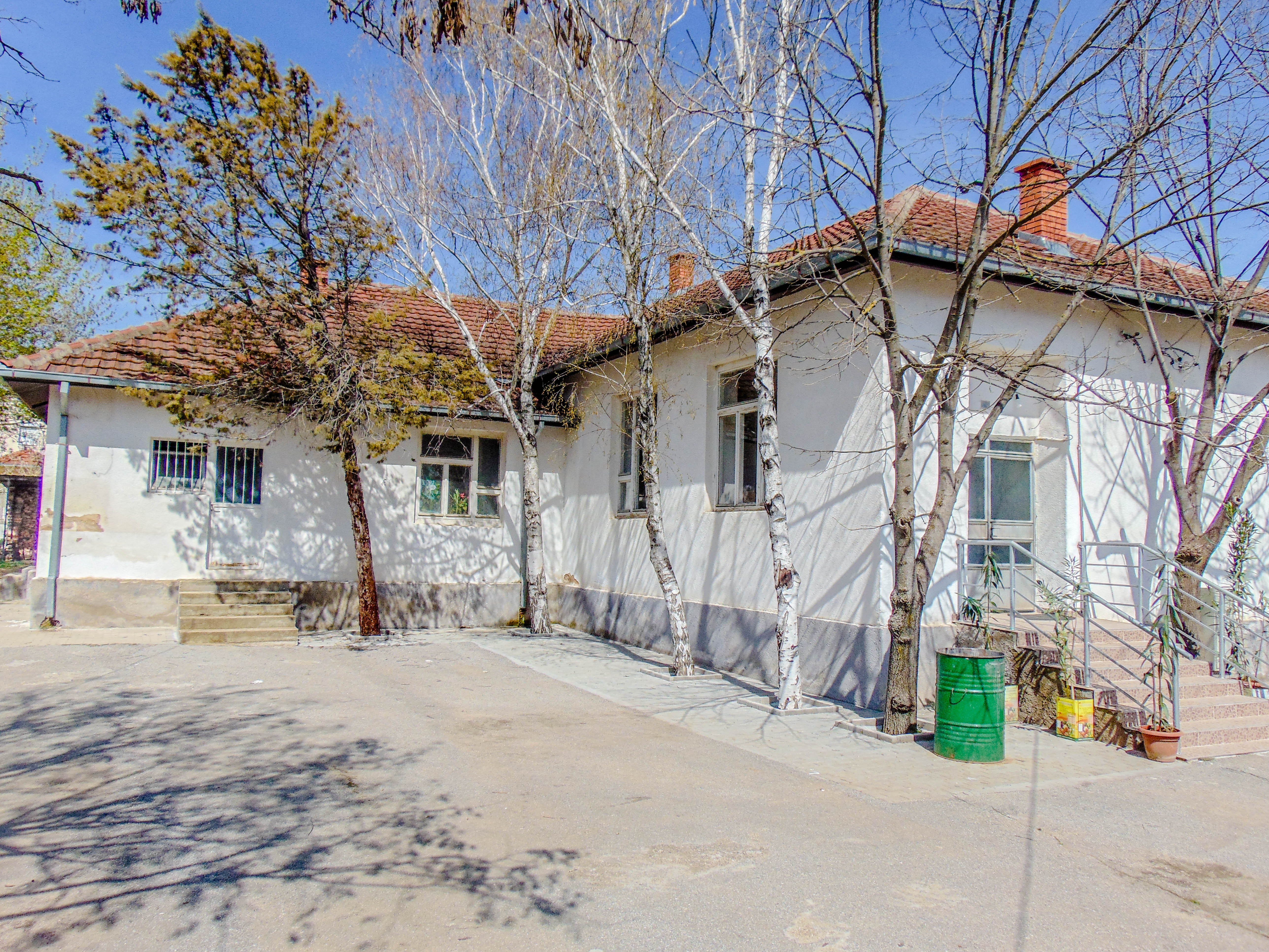 ОУ „Мануш Турновски“ - Ново Коњарево